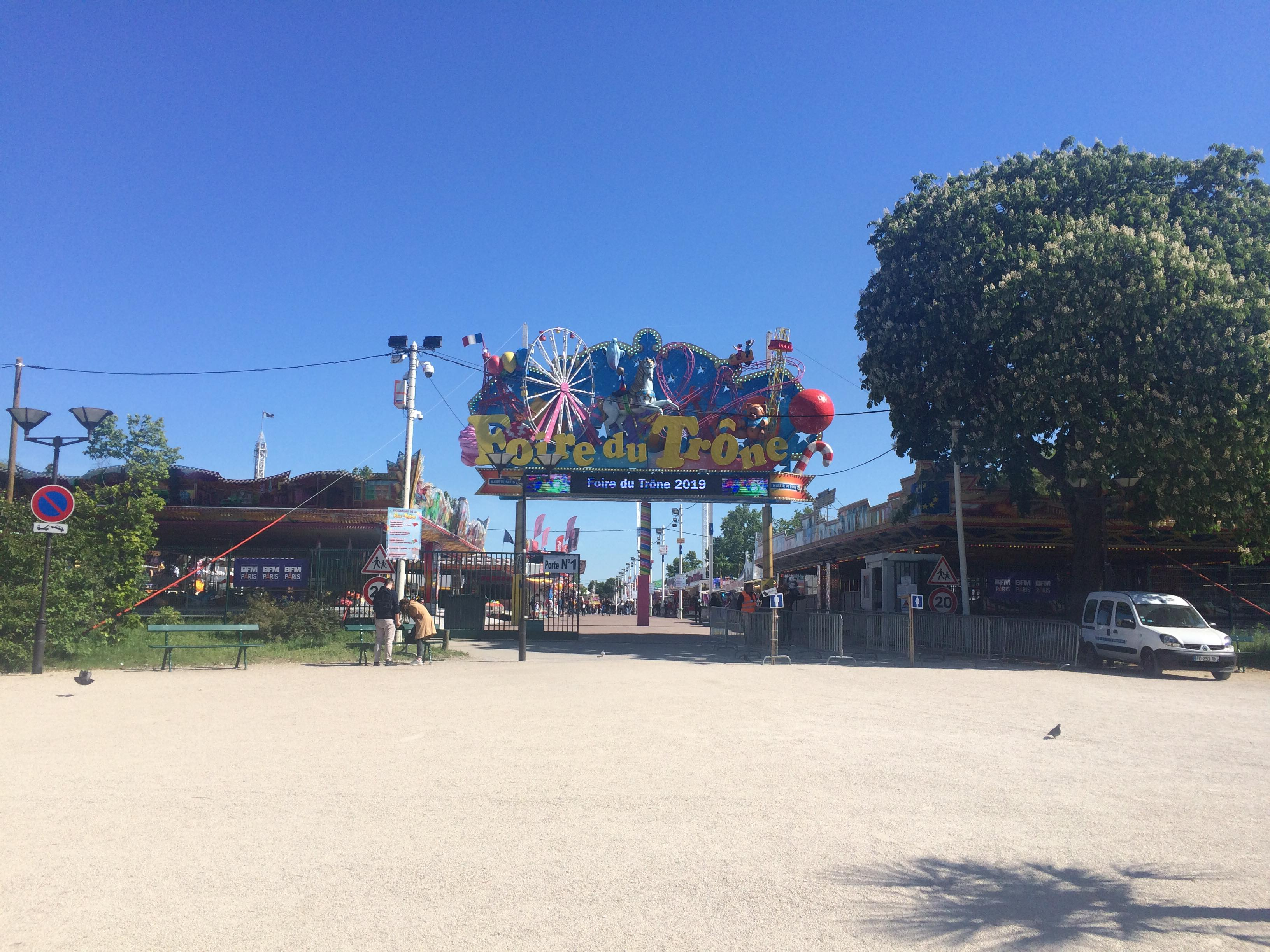 Entrée de la Foire du Trône en Mai 2019